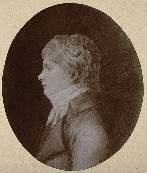 Jean-Frédéric de Turckheim (1780-1850). Maire de Strasbourg (1830-1835), député (1824-1829), président du Tribunal de Commerce, président du Directoire de la Confession d'Augsbourg. Revue alsacienne illustrée. 1910. Bibliothèque nationale et universitaire de Strasbourg